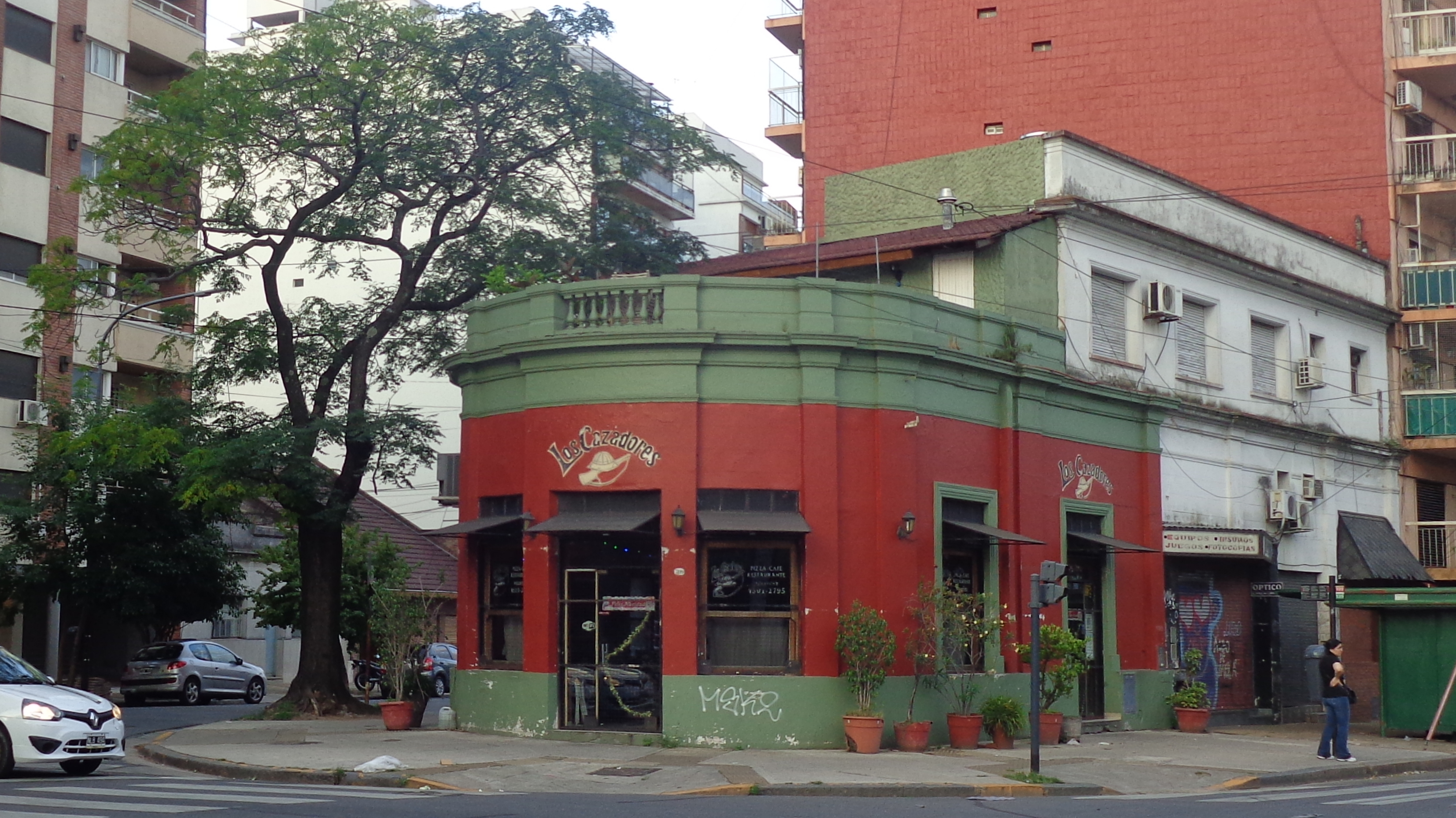 Restaurante Los Cazadores.